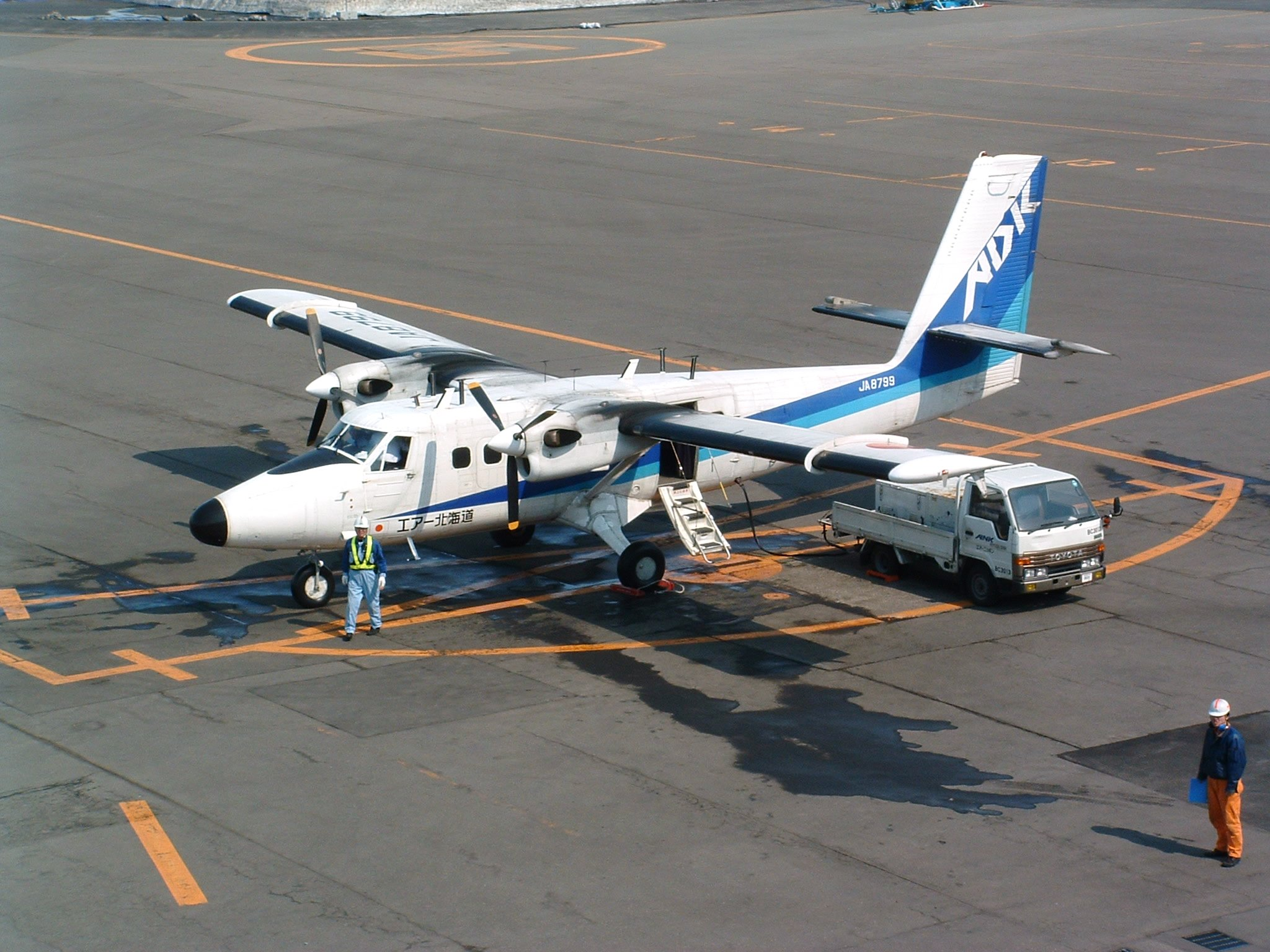 撮影日/2003年4月3日 撮影地/丘珠空港（OKD/RJCO）